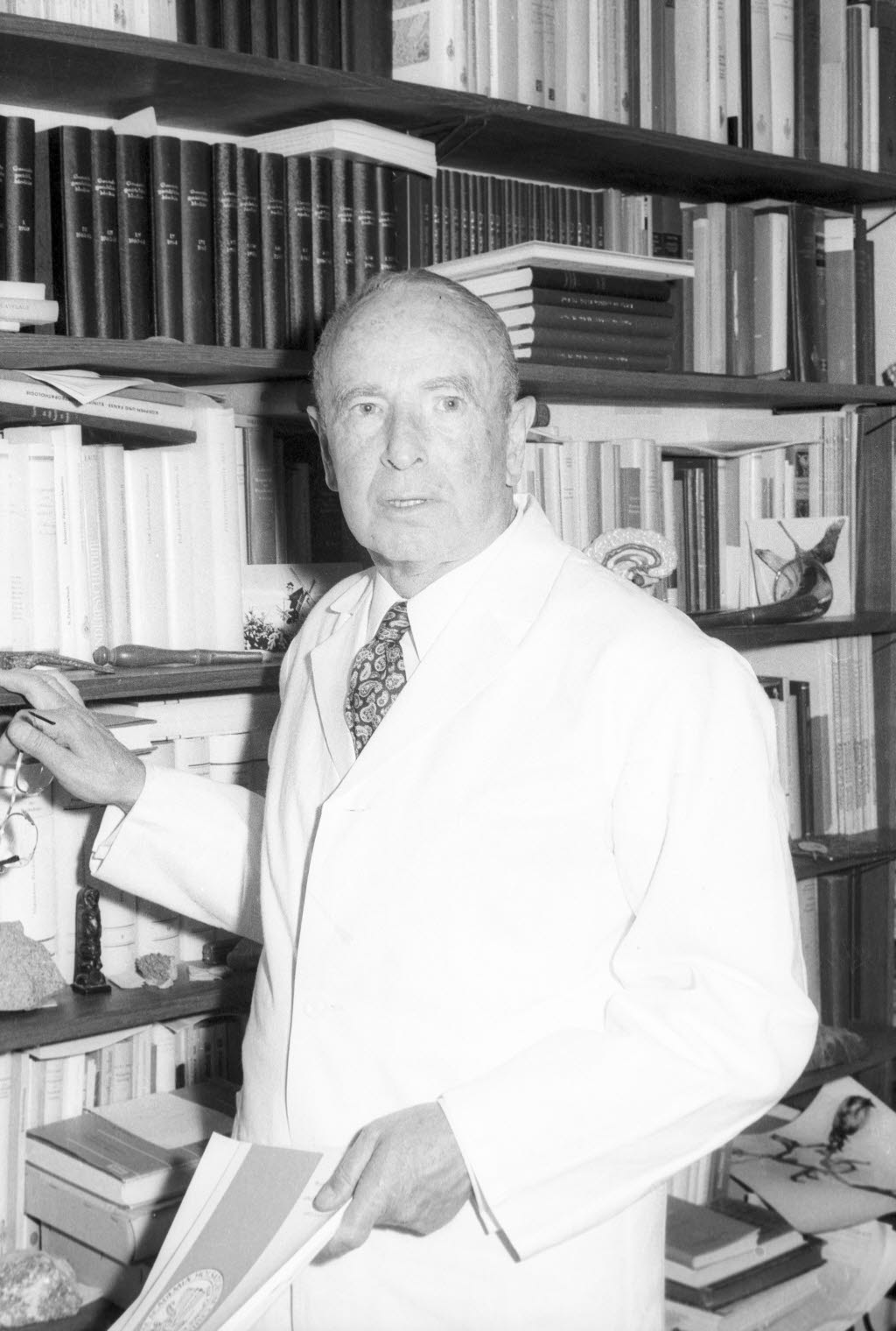 Rechtsmediziner, Leiter des Instituts für Gerichtliche und Soziale Medizin der Christian-Albrechts-Universität (CAU), außerdem langjähriger Leiter des Studentenwerks Schleswig-Holstein. Als Gutachter in den Fall Heyde-Sawade (NS-Euthanasiearzt) verwickelt.